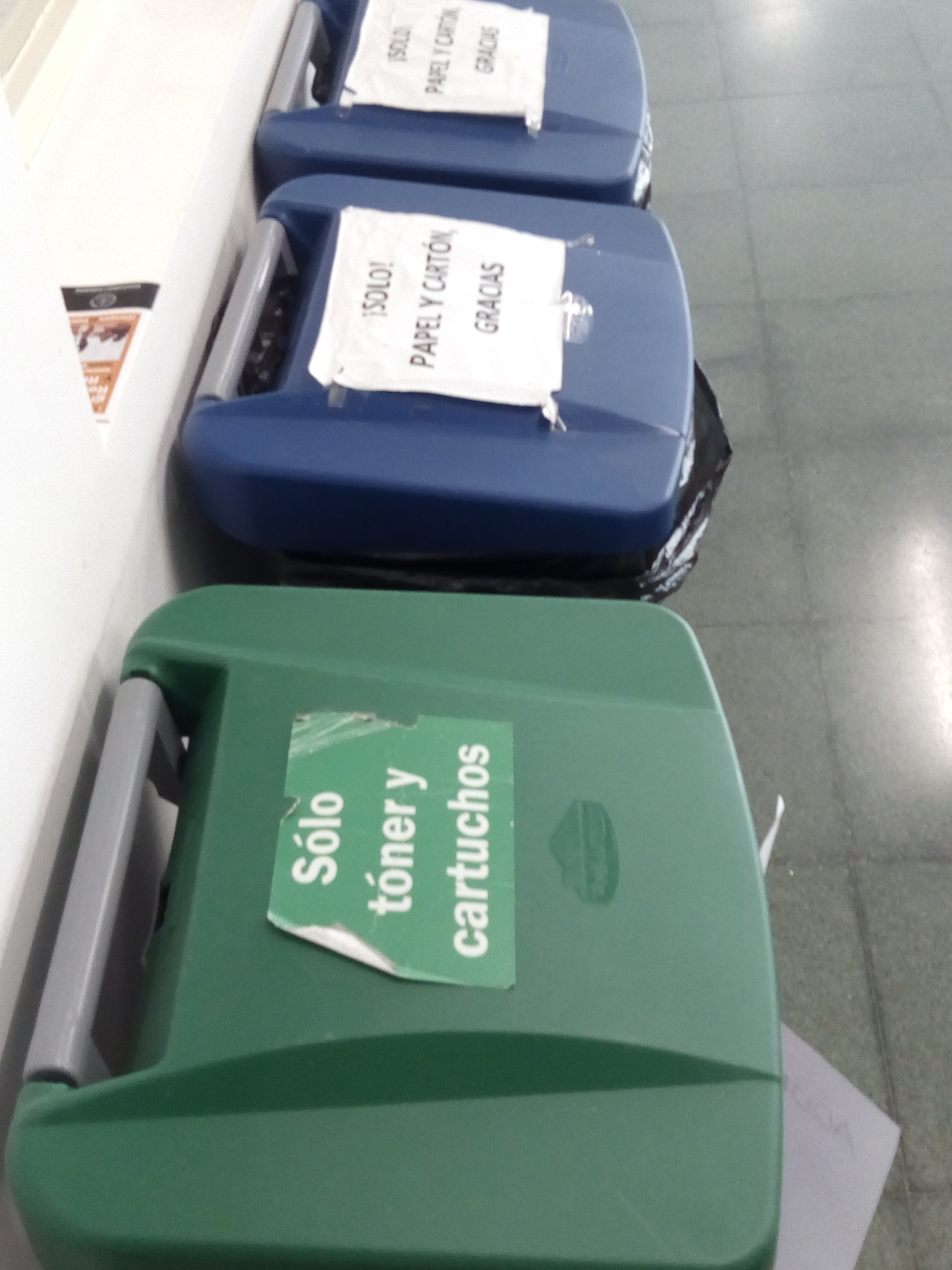 reciclado